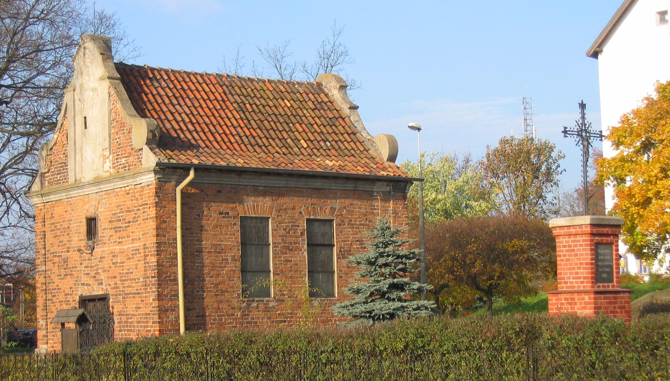 Kaplica Jerozolimska w Olsztynie (zrobione 27.10.2007)